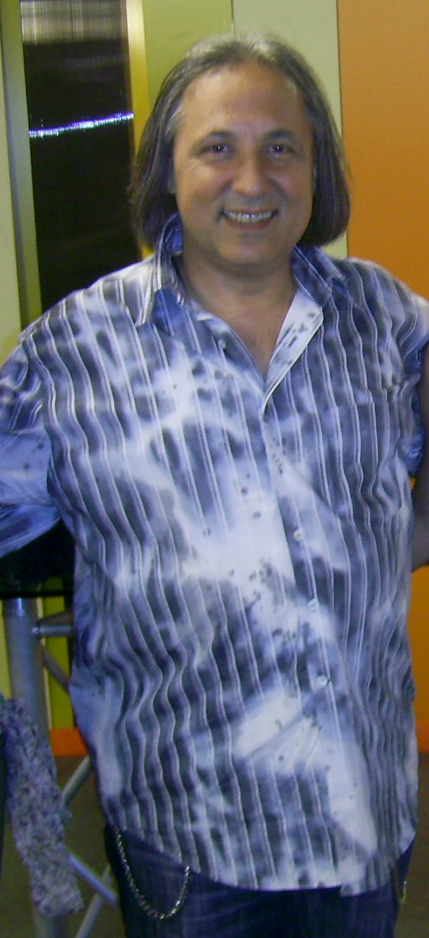 Бате Енчо